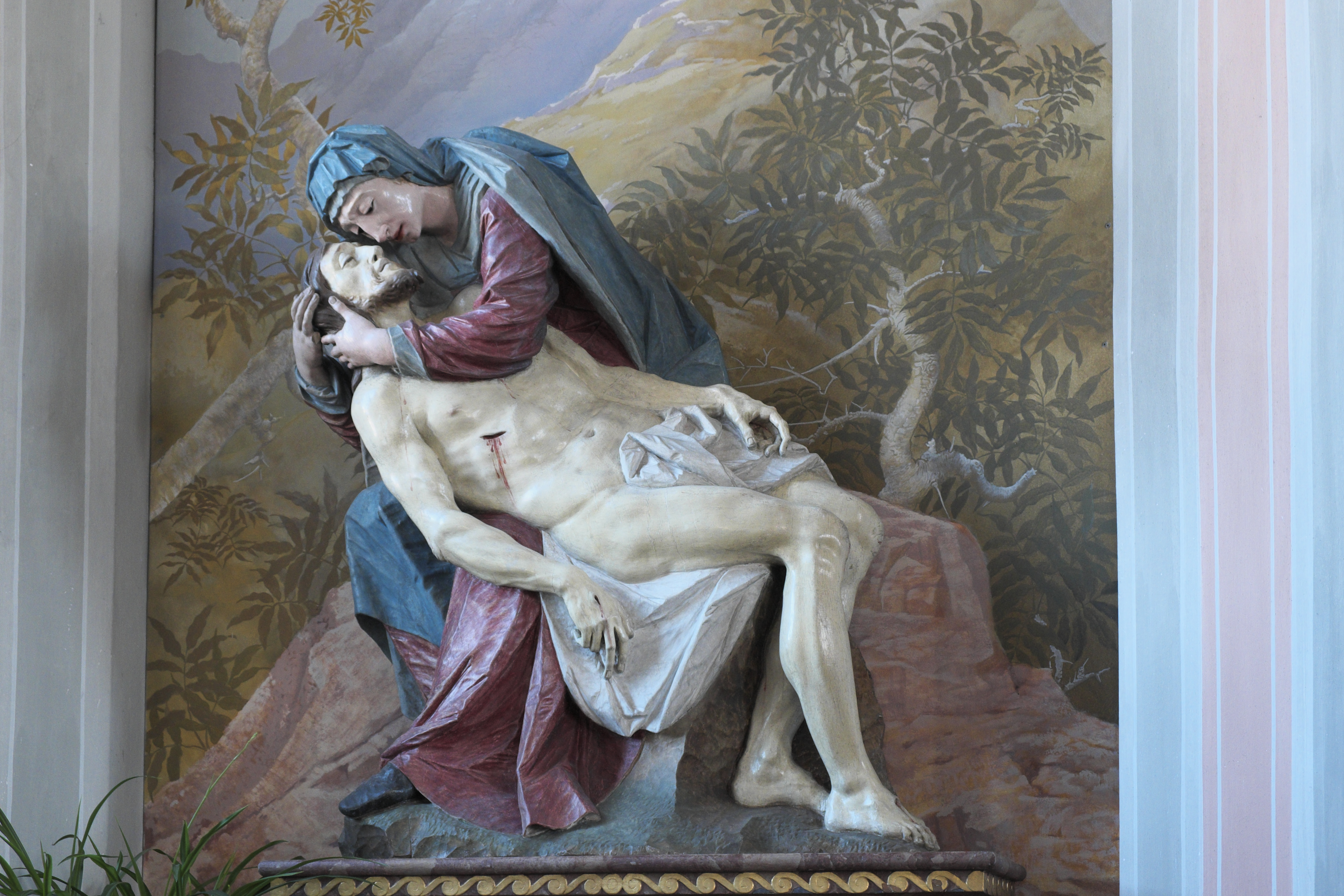 Katholische Pfarrkirche St. Rupertus in Eiselfing im bei Wasserburg (Bayern/Deutschland), Pietà von Ignaz Günther, mit Signatur und Jahreszahl 1758 auf der Rückseite